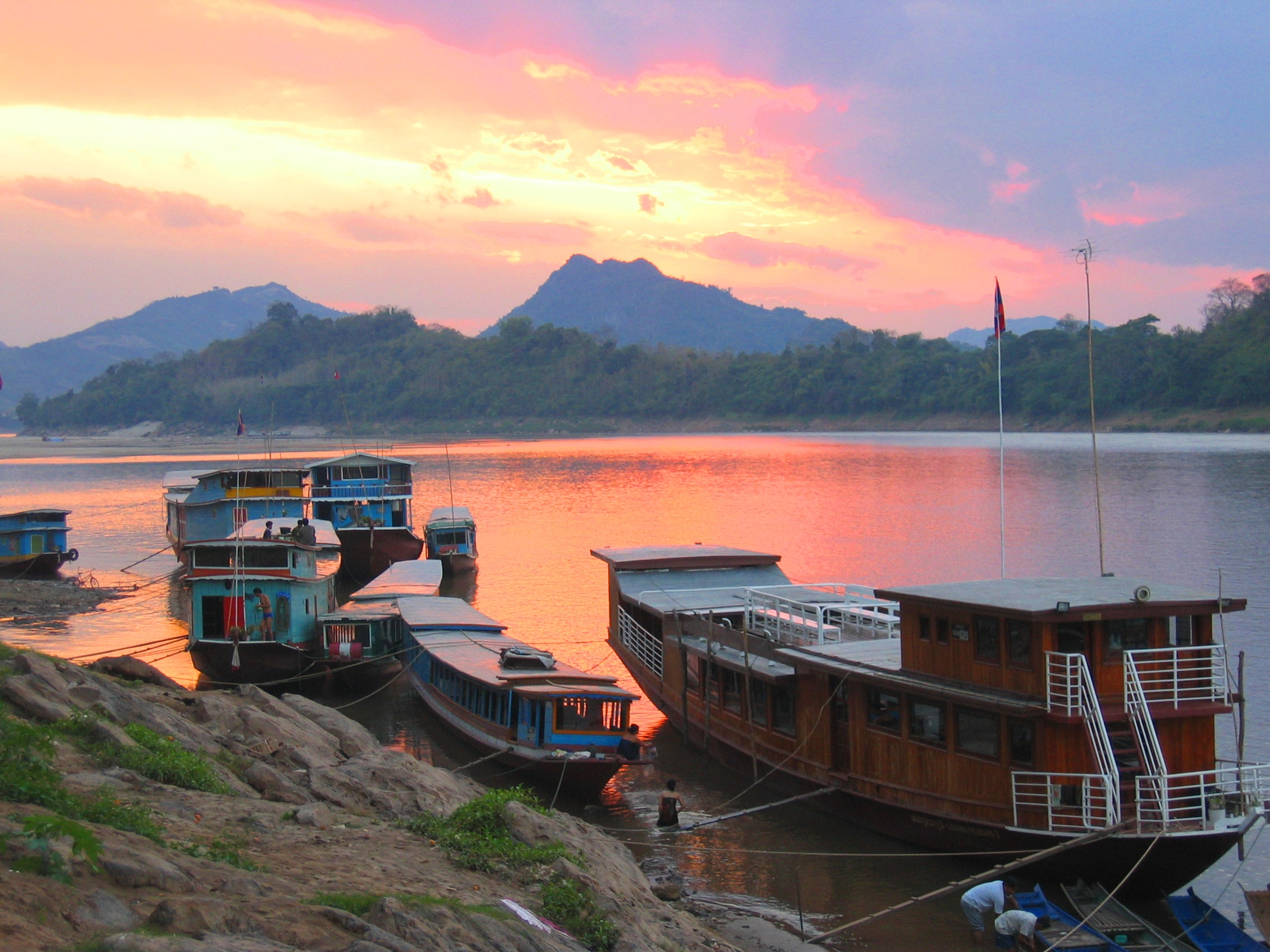 Sonnenuntergang Abendrot Luang Prabang Laos